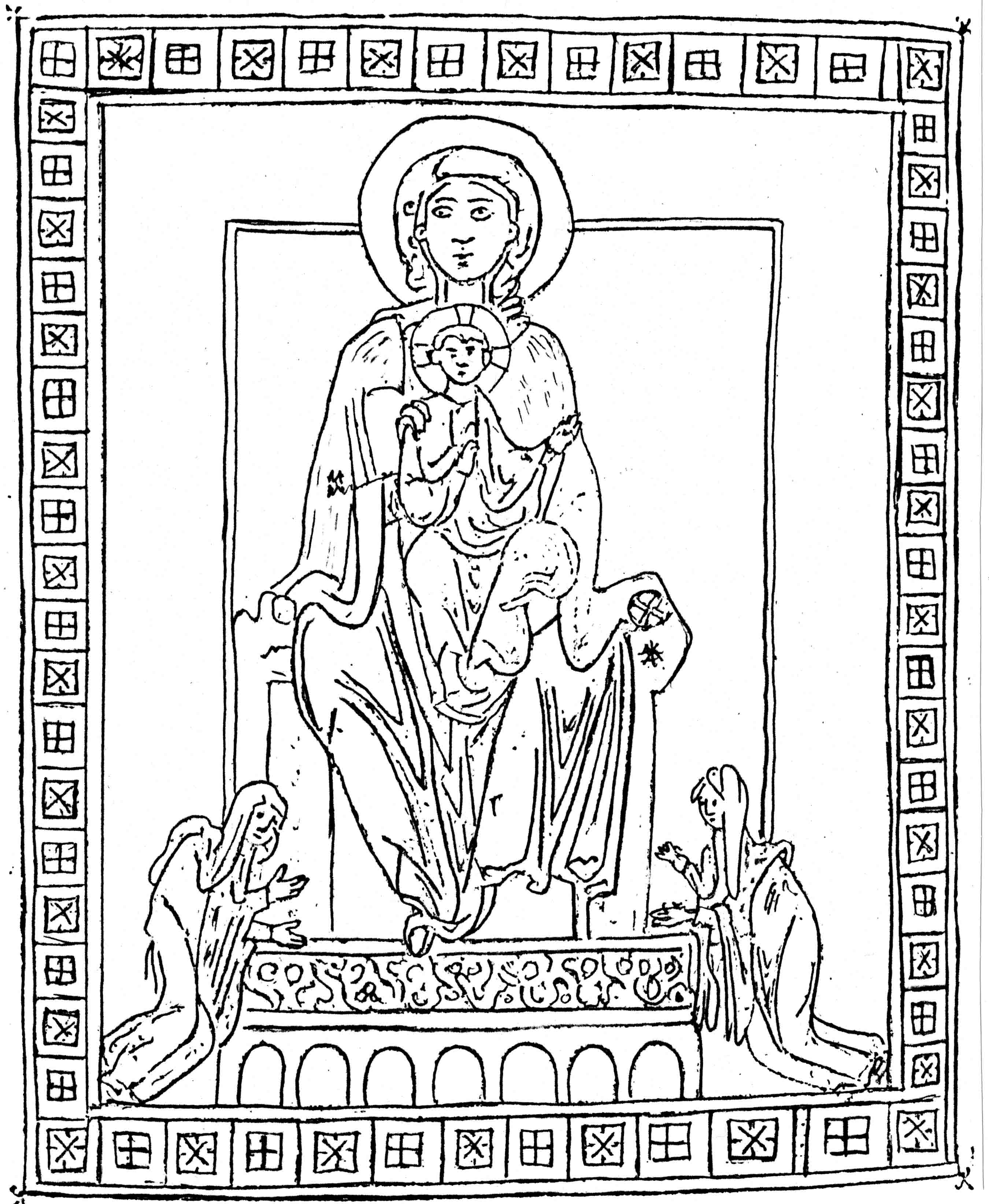 Widmungsblatt zur Gründung des Stiftes Seckau